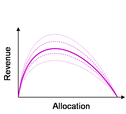 Total revenue uncertainty